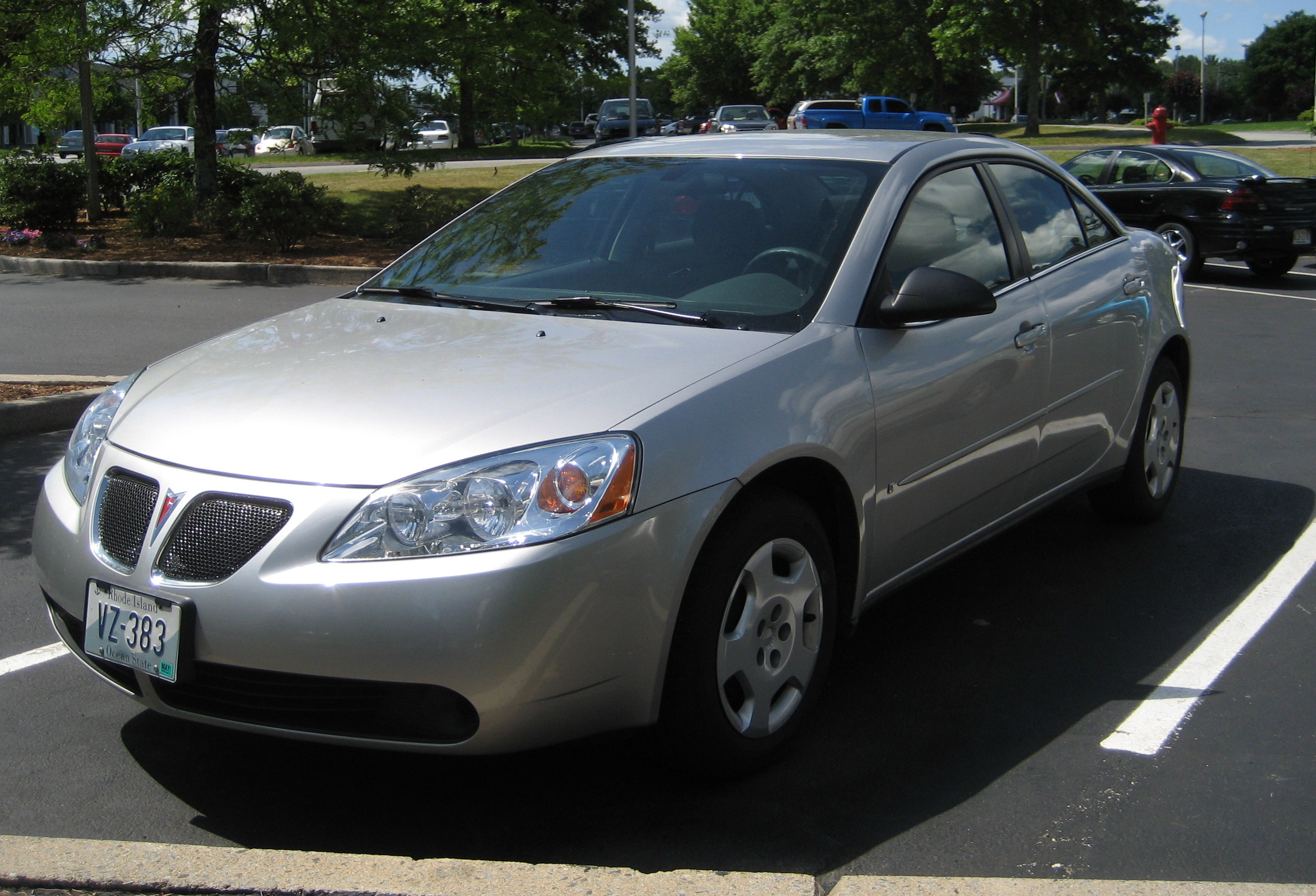 2006 Pontiac G6 PO